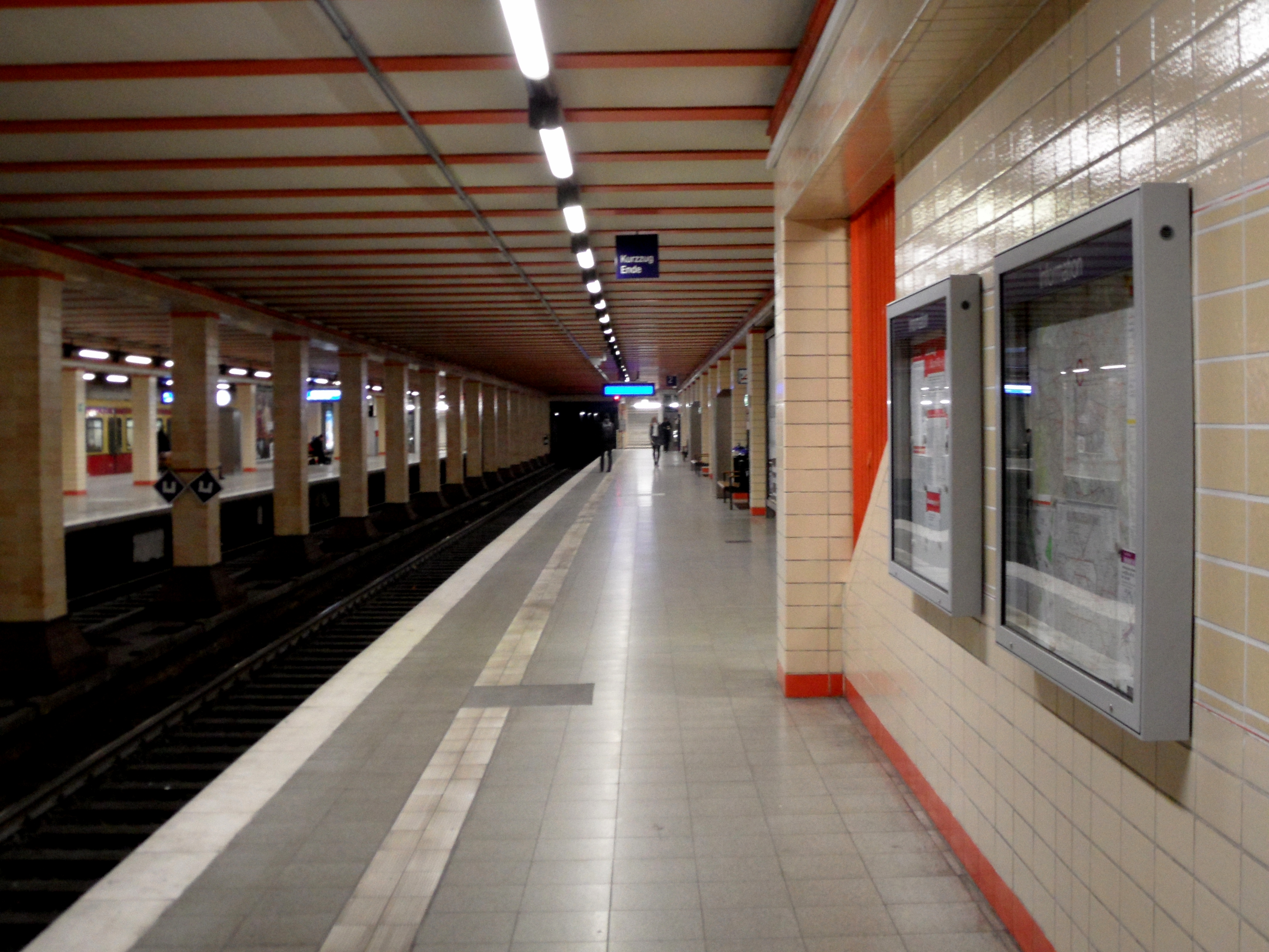 Berlin - S-Bahnhof Nordbahnhof - Linien S1, S2, S25